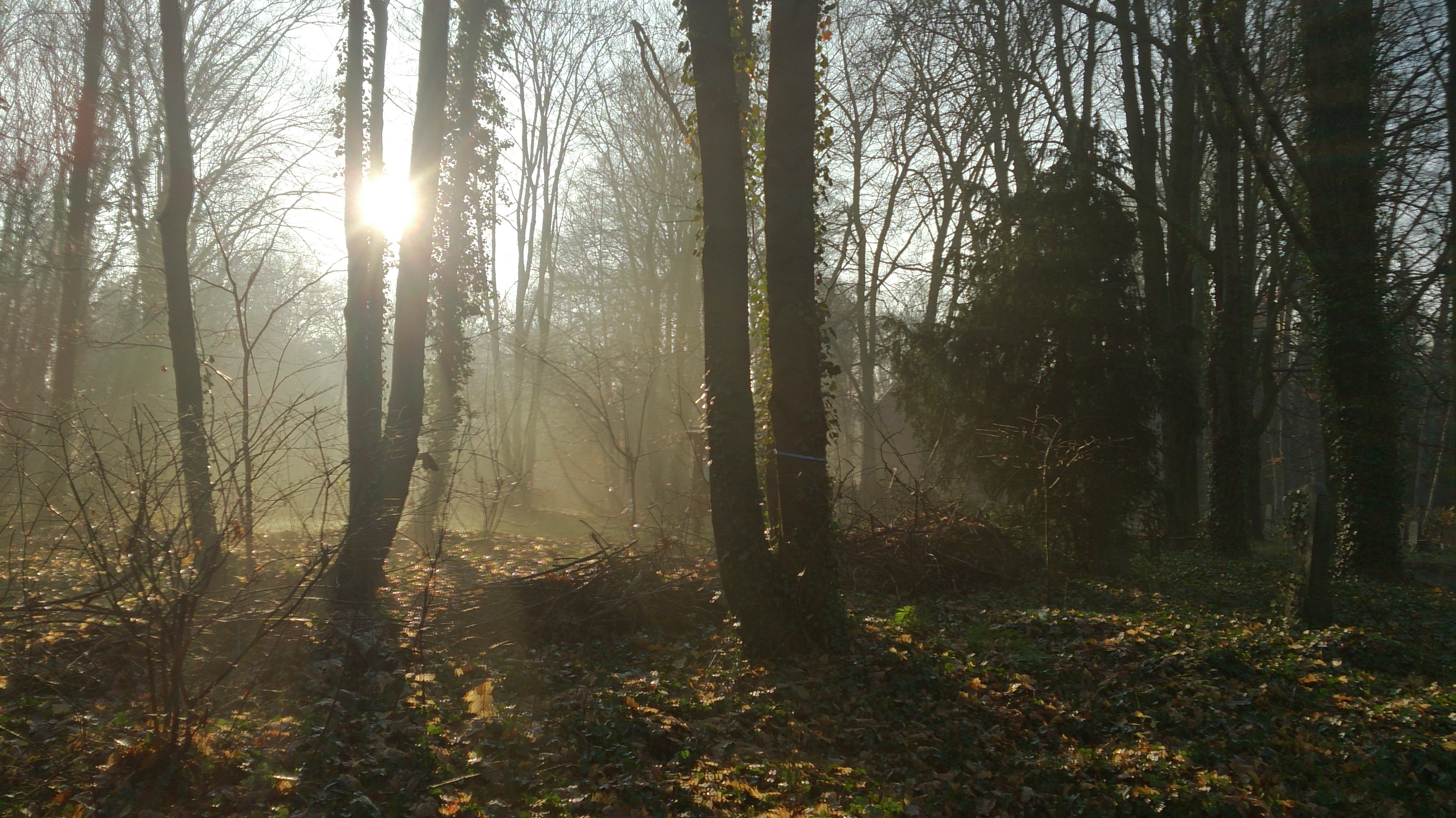 Kirchhof St. Bartholomäus: Bestattungswald im Winter